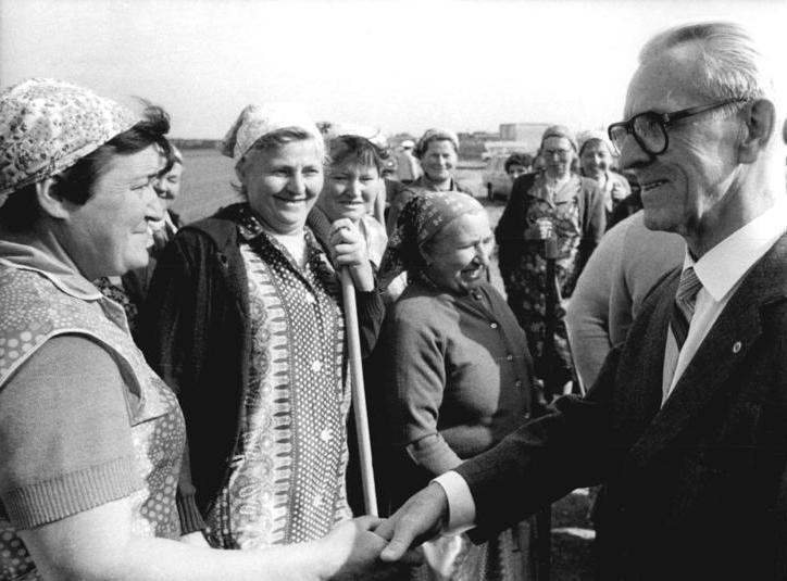 LPG Colmnitz, Besuch von Willi Stoph ADN-ZB Hiekel 18.5.83 Bez. Dresden: Der Vorsitzende des Ministerrates der DDR, Willi Stoph (r.), Mitglied des Politbüros des ZK der SED, weilte in der LPG Pflanzenproduktion "Kanalgebiet" Colmnitz im Kreis Riesa. Während seines Aufenthaltes kam es zu Gesprächen mit einer Feldbaubrigade.